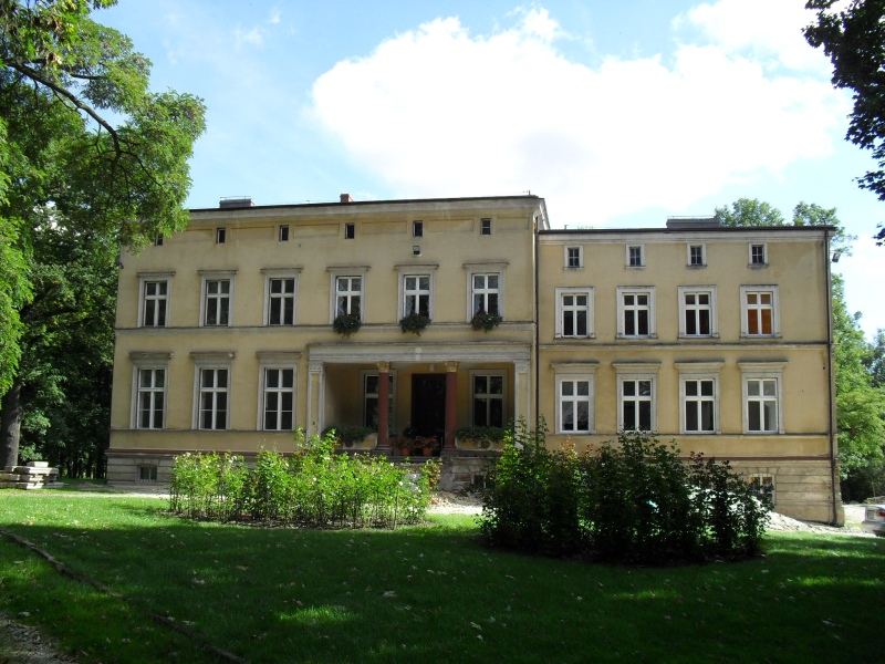 Pałac z XIX w. w Luszkówku 05.2005.